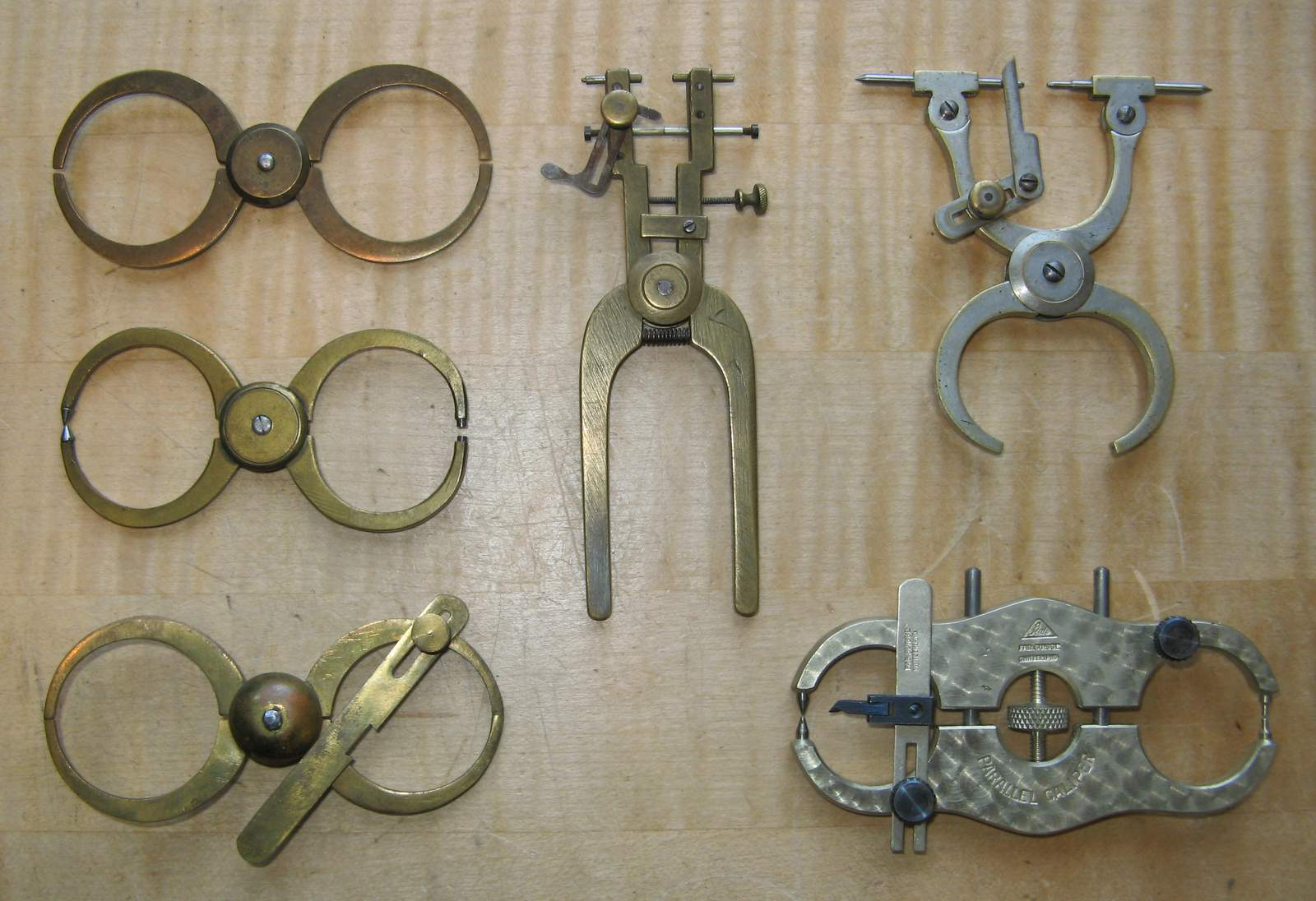 Rundlaufzirkel in verschiedenen Ausführungen. Vorne mit parallel verschiebbaren Backen.